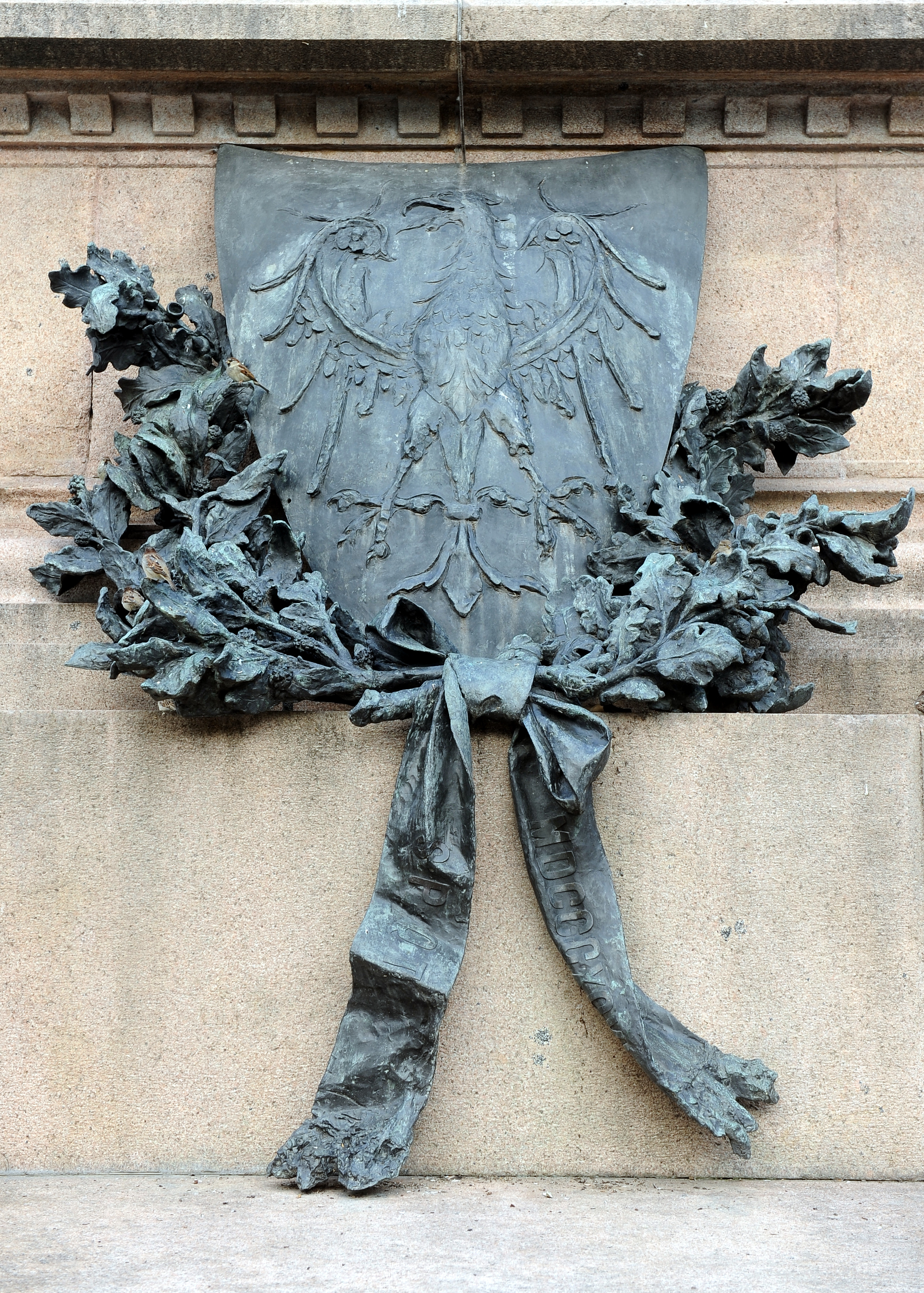 Monumento a Dante Alighieri This is a photo of a monument which is part of cultural heritage of Italy.